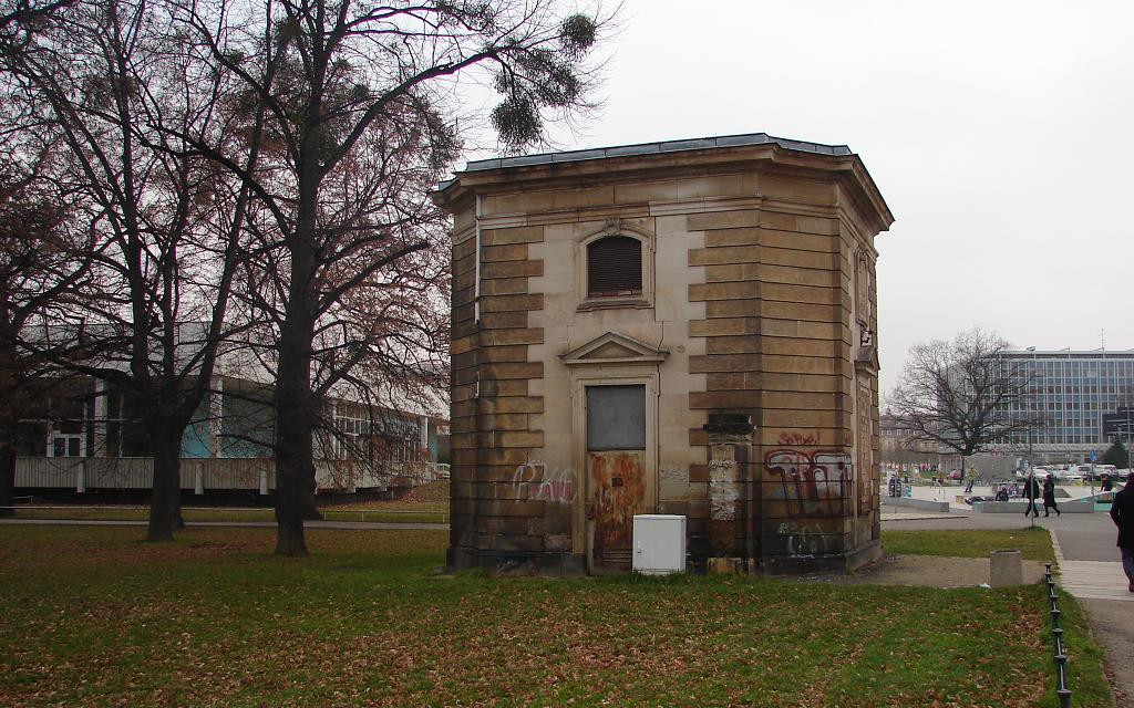 Ehemaliges Torhaus zum Blüherpark an der Lingnerallee in Dresden